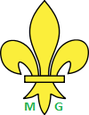 Organisation internationale des Amicales du Scoutisme [1] OIAS